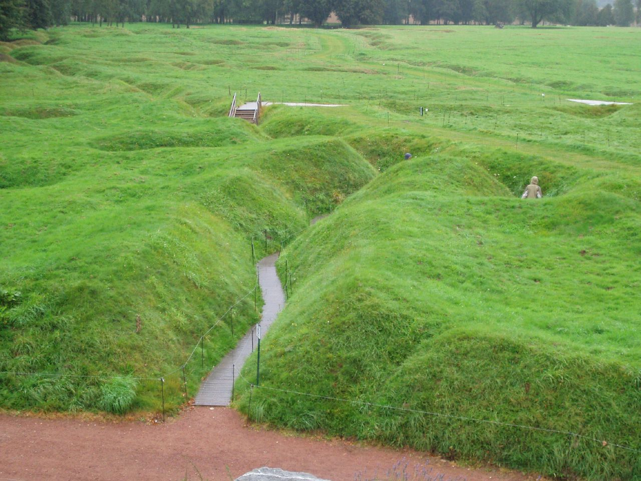 Beaumont-Hamel (Somme, France) Les tranchées.